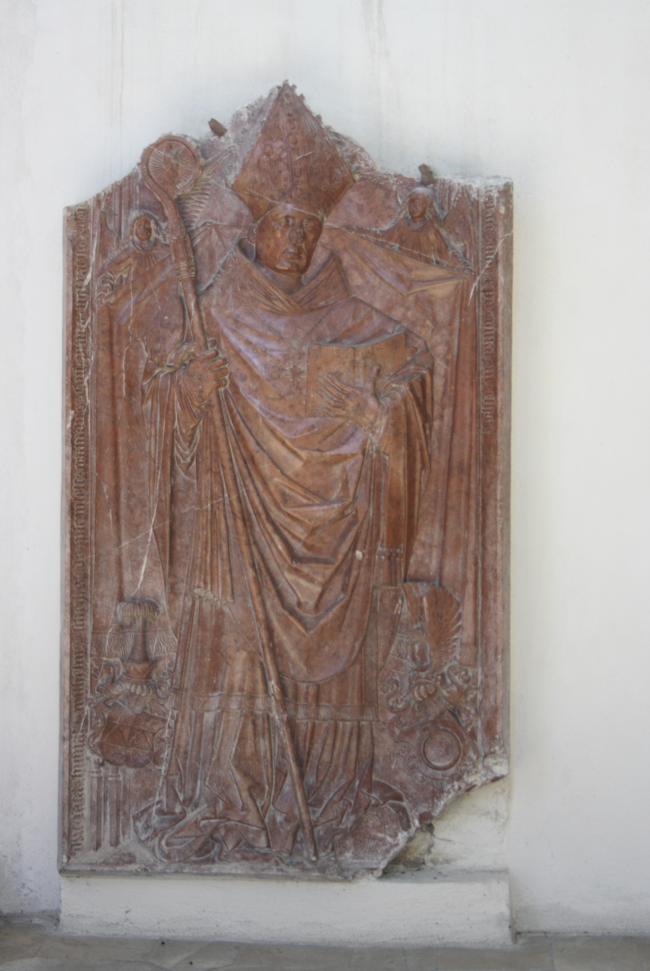 Evangelische Pfarrkirche, ehemalige Benediktinerklosterkirche St. Maria in Auhausen im Landkreis Donau-Ries (Bayern), Rotmarmorplatte für den Abt Wilhelm Schechs von Pleinfeld († 1499) an der Südwand des Chores, um 1500